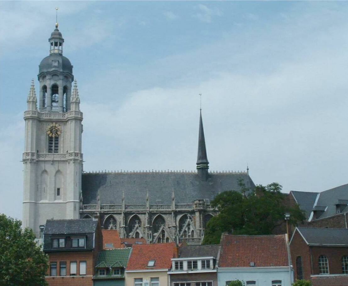 Foto Guy Debognies 28 juni 2005